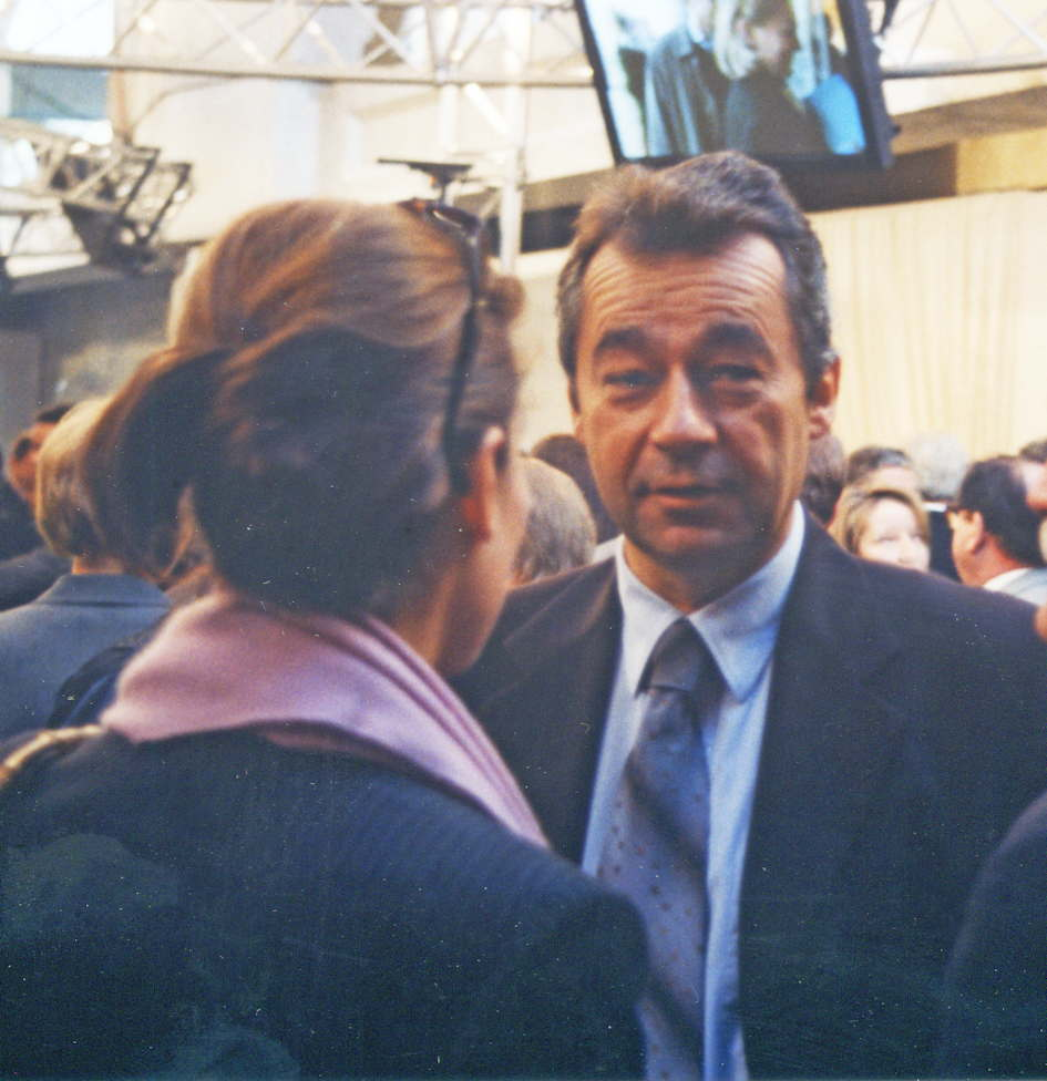 Le dirigeant de télévision, de club de football, producteur TV et journaliste Michel Denisot en 1999